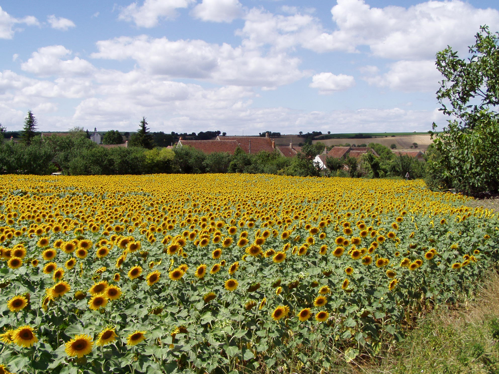 Marcy, Nièvre.